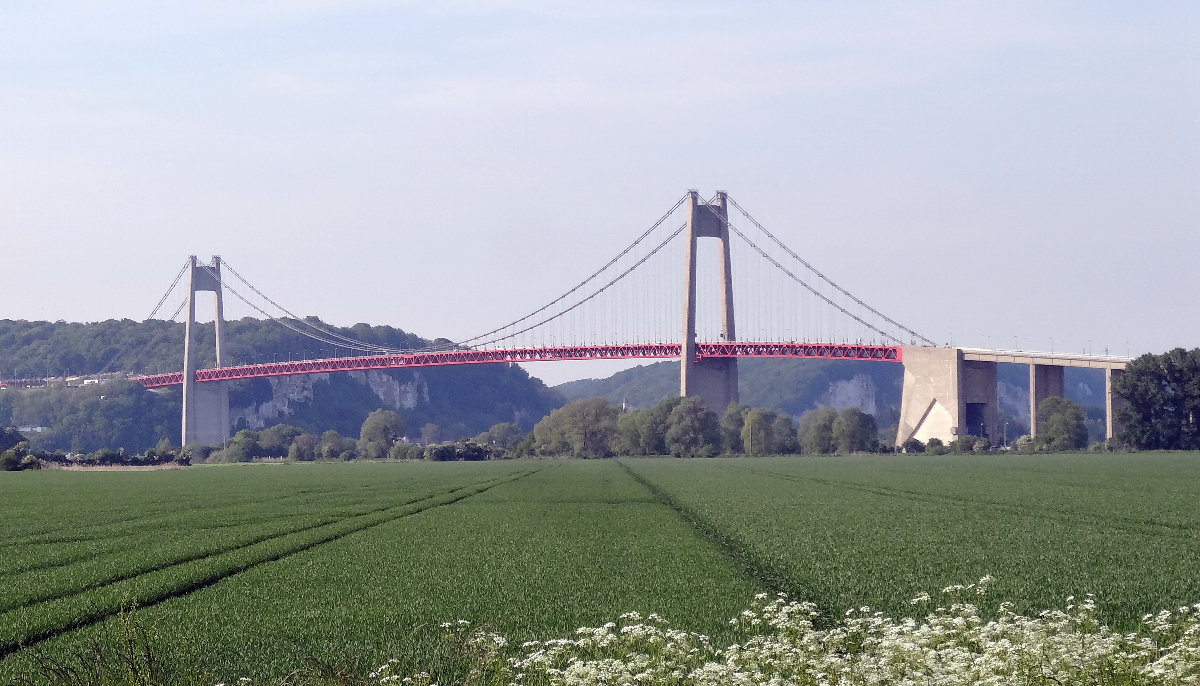 Vallée de Seine - Tancarville (Haute-Normandie)